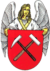 znak obce Nalžovské Hory